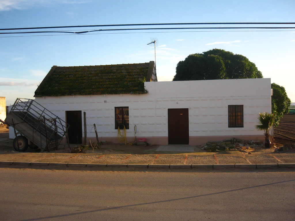 Choza de la Colonia Agrícola de Monte Algaida, Sanlúcar de Barrameda (España)